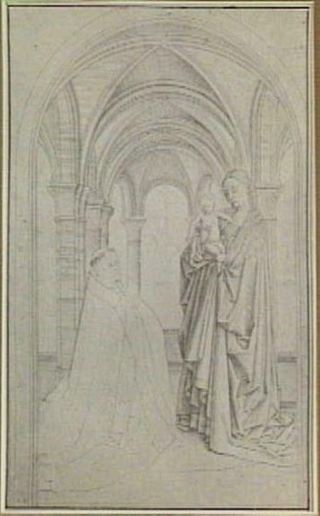 Madonna met kind en biddende donor